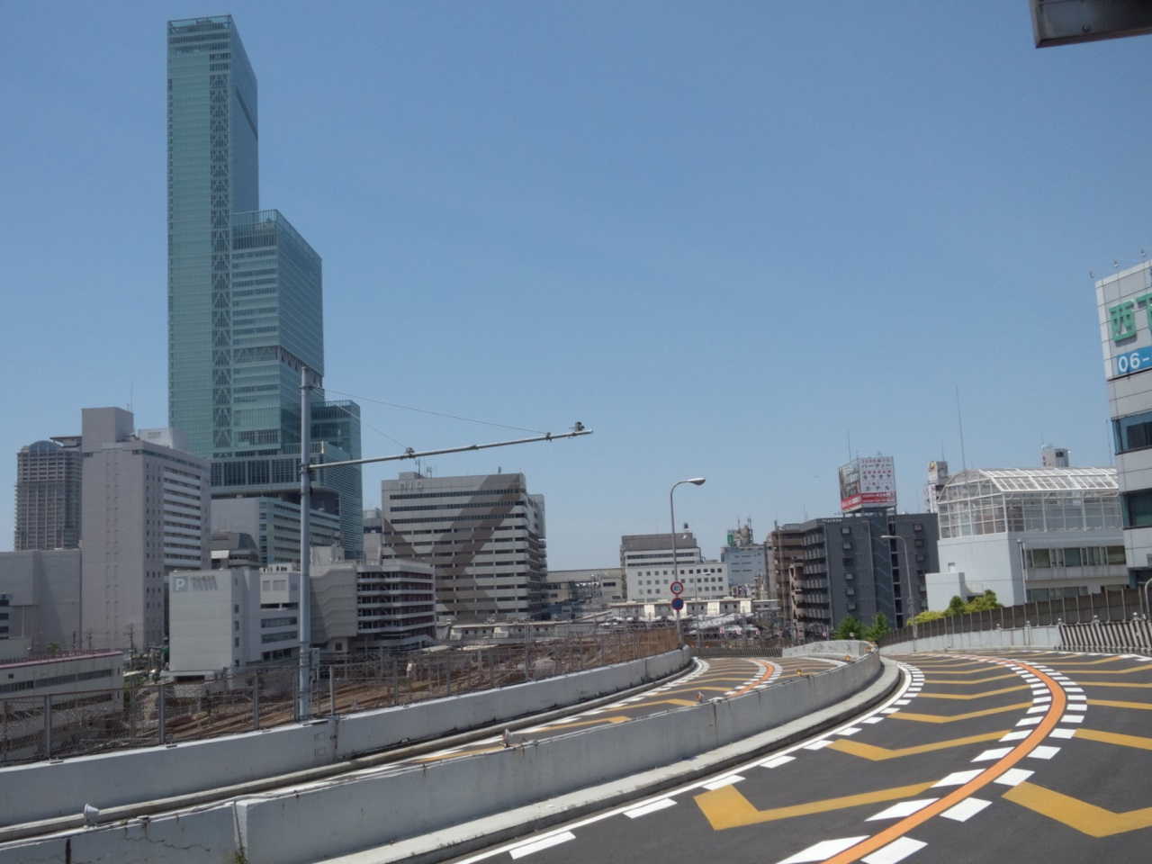 天王寺バイパスから望むあべのハルカス